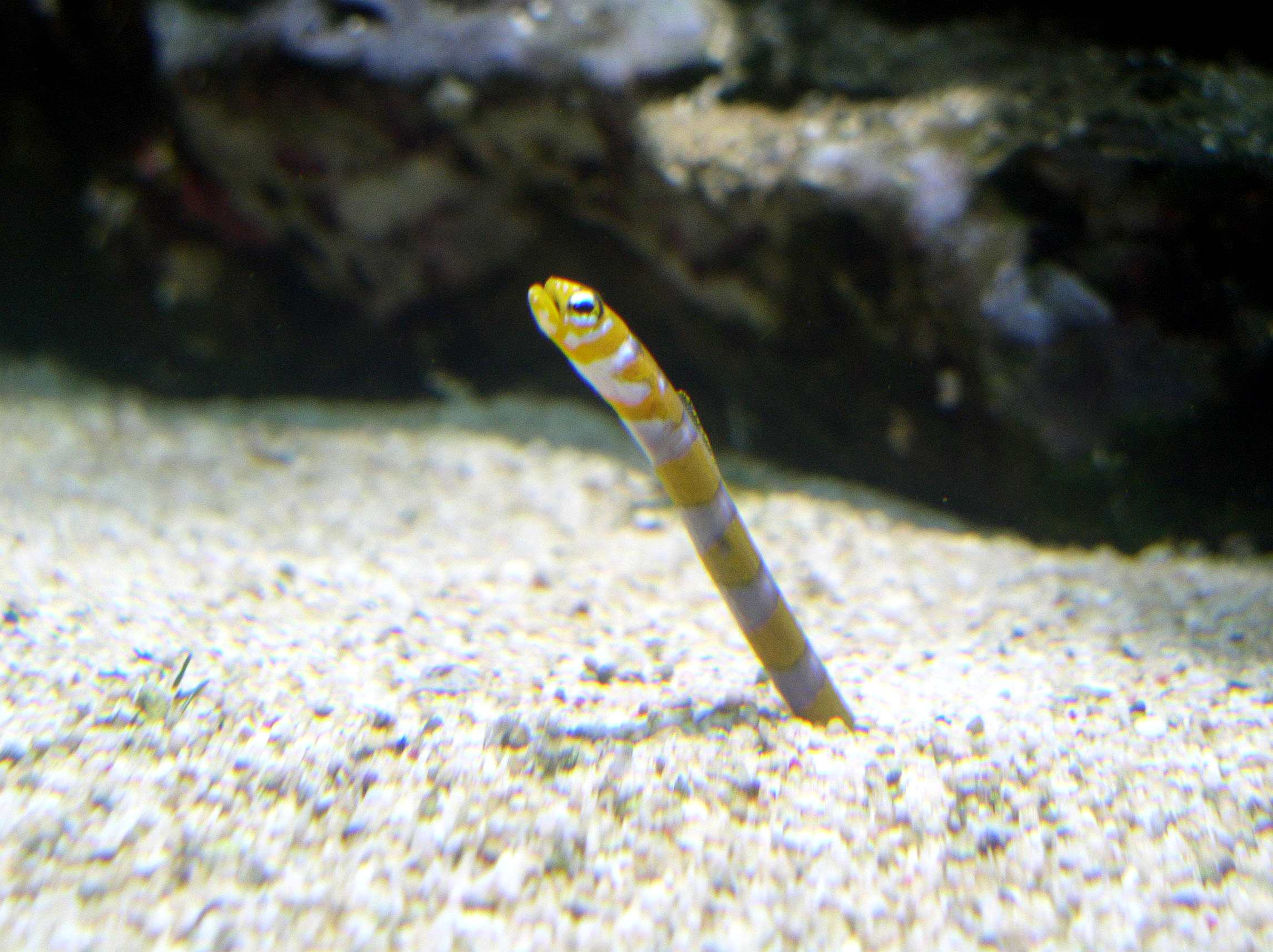 Pracht-Röhrenaal (Gorgasia preclara)